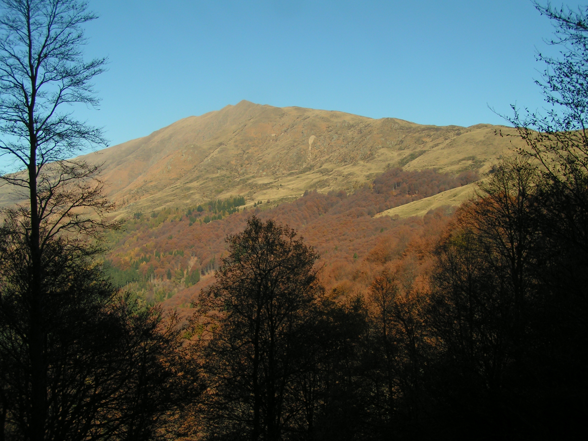 Gazzirola versante sud